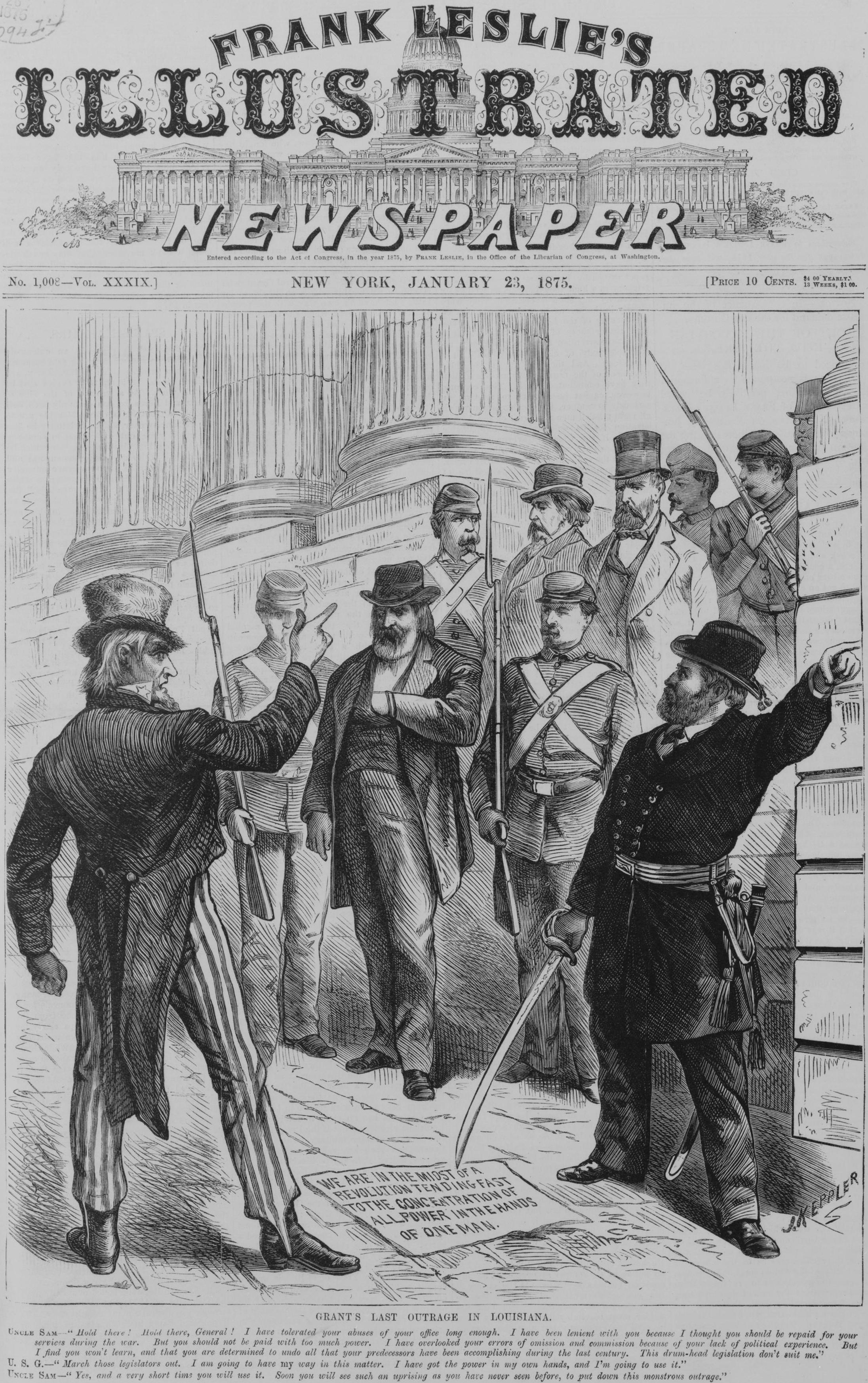 Cartoon: "Grant's last outrage in Louisiana"